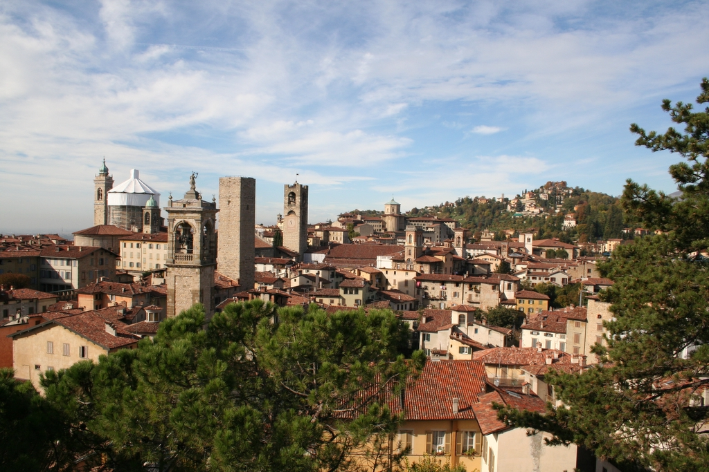 Autore Giorces. Bergamo alta dalla Rocca.